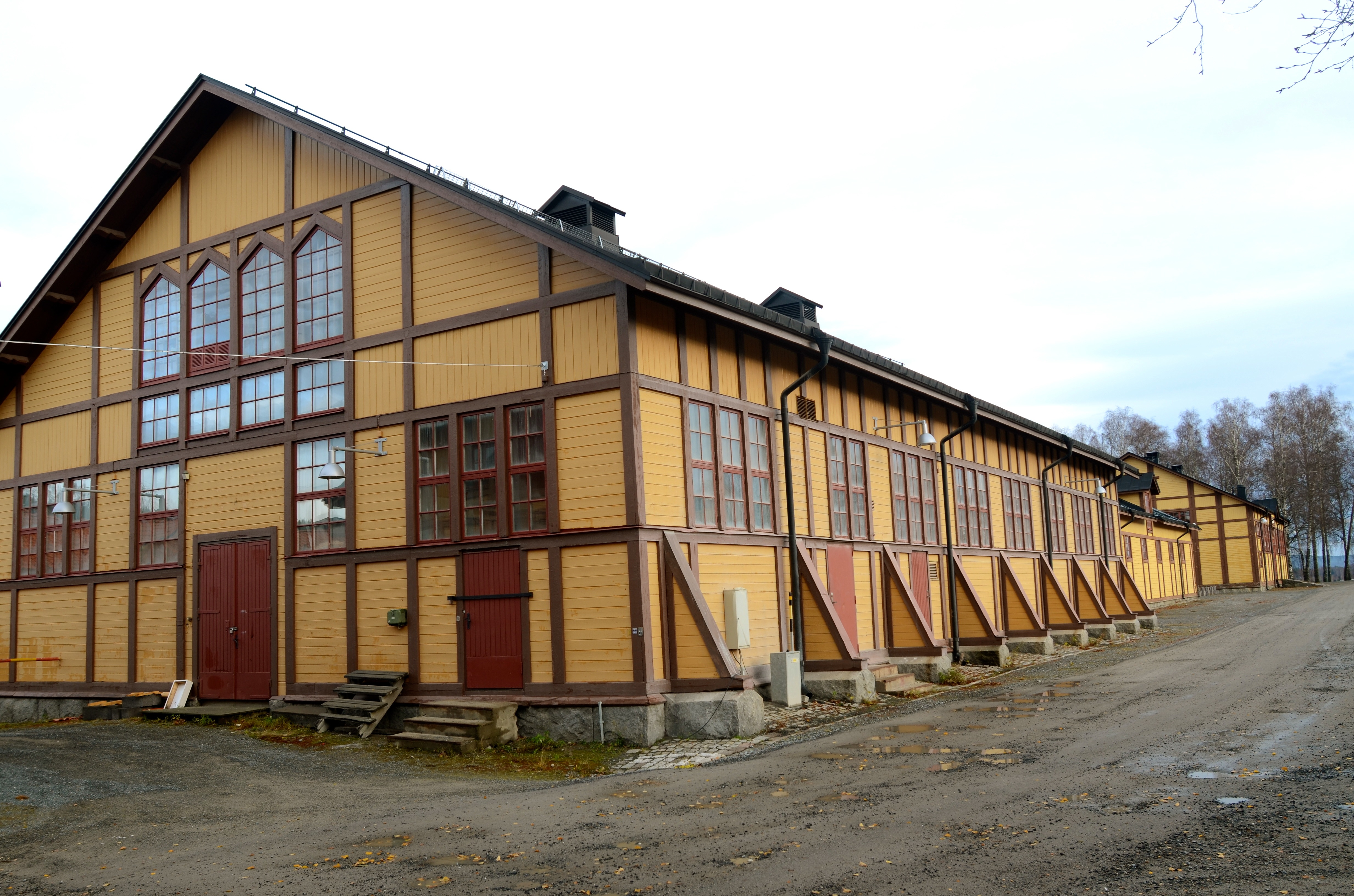 Norrlands Trängregemente/T3 (Remsle 13:64), Kasernetablisemang 13 byggnader